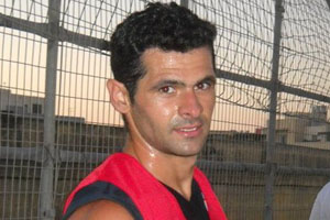 Picture of Ricardo Mion Varella Costa.